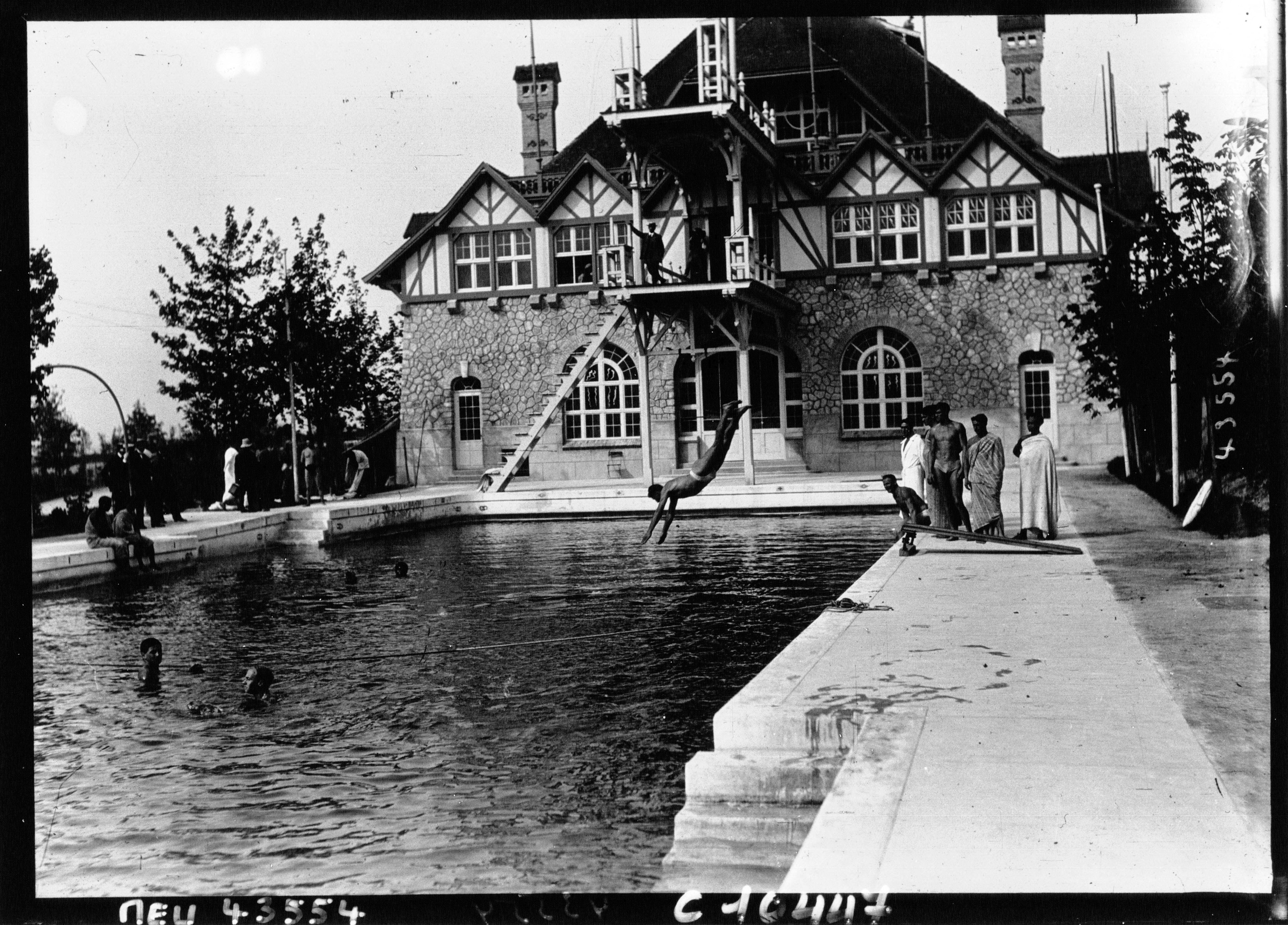 Au Collège d'athlètes, la piscine : Jean Bouin plonge.